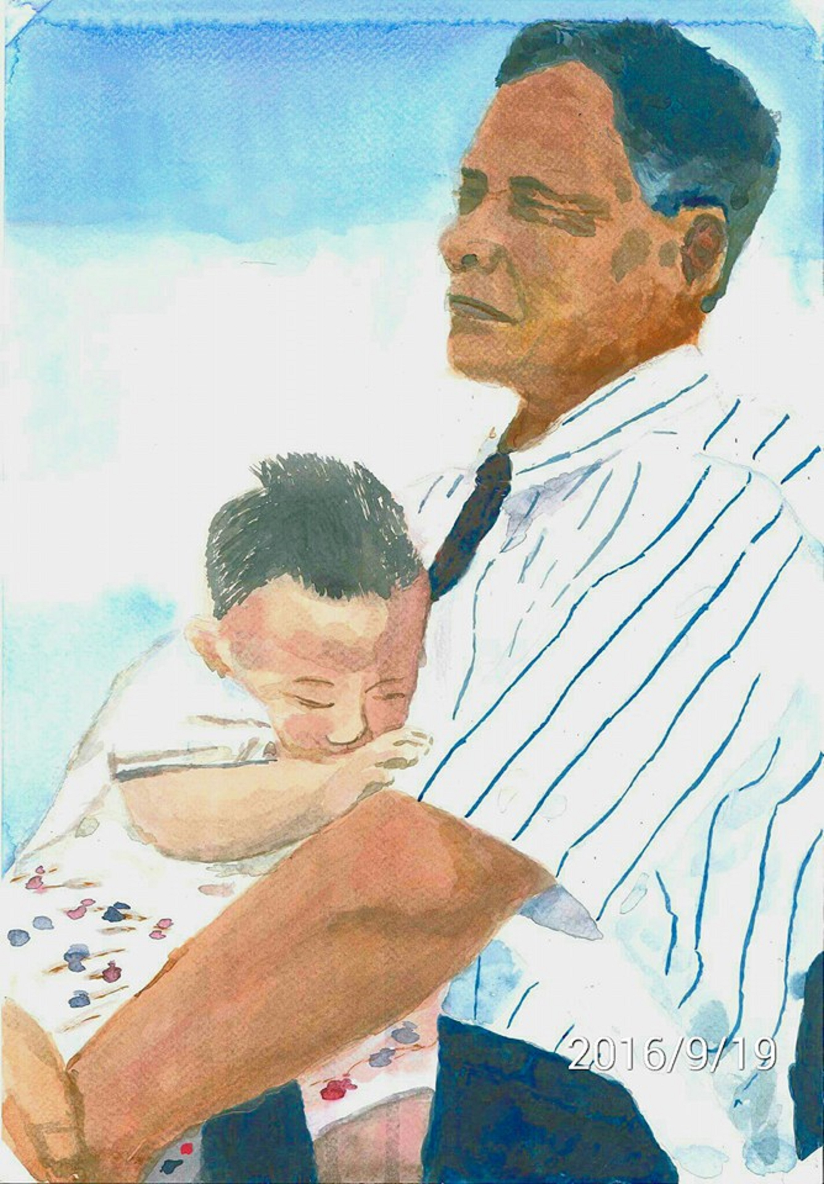 帝瓦伊撒耘人物水彩畫像